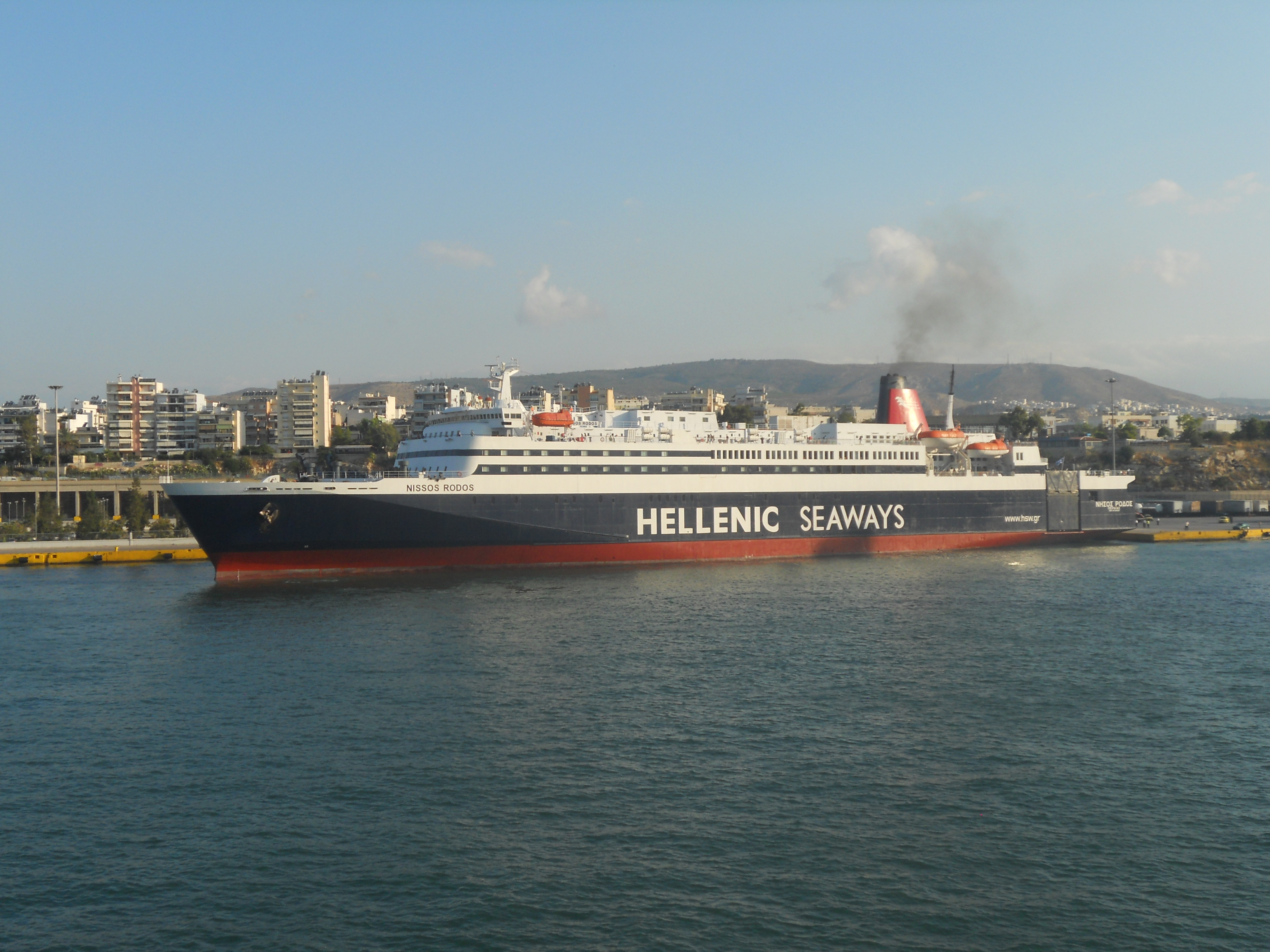 Le Nissos Rodos au port du Pirée